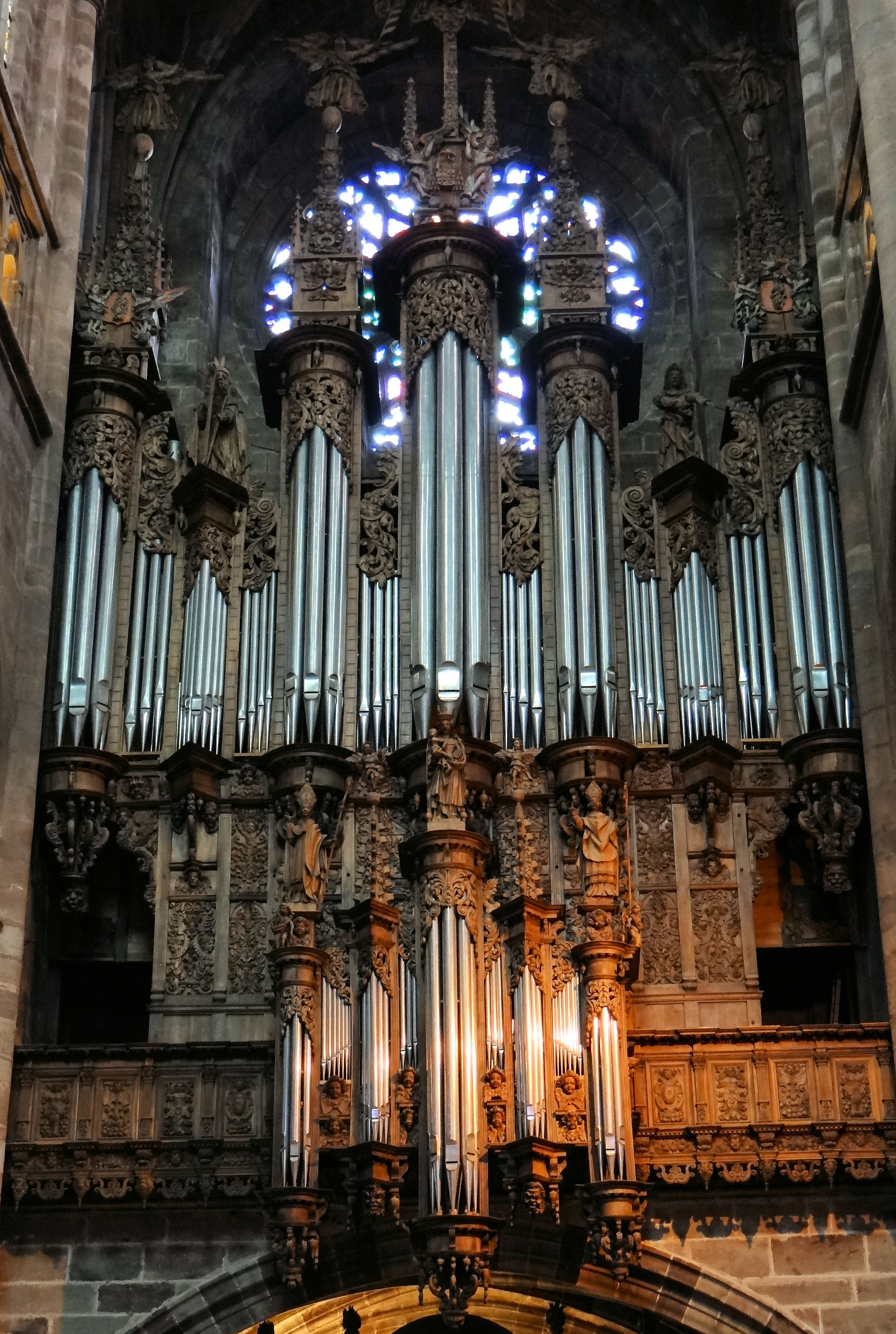 Rodez - Cathédrale Notre-Dame - Bras nord du transept : orgue